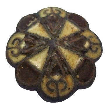 гудзик прикраса накладка Київської Русі